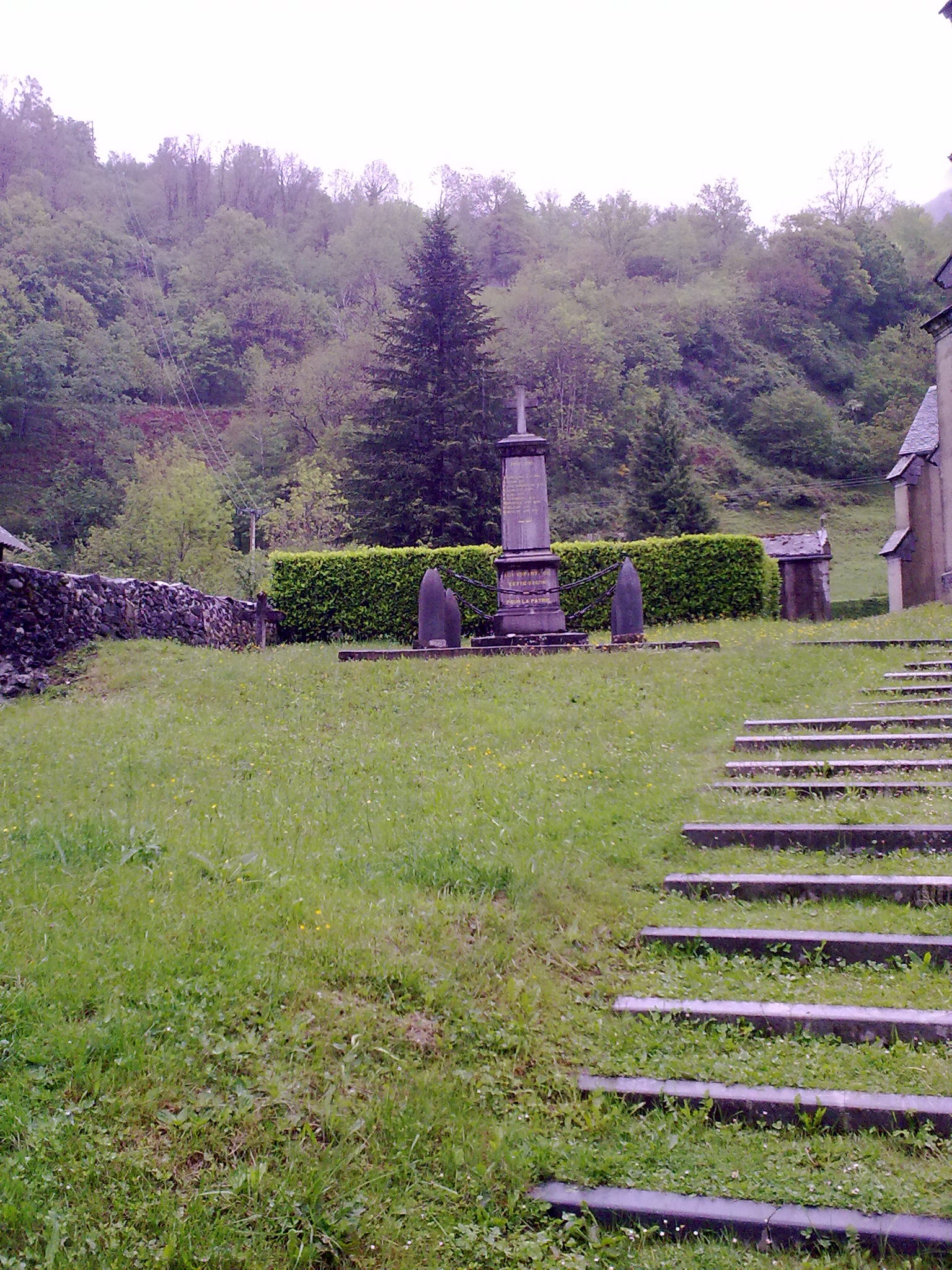 Cette-Eygun, France